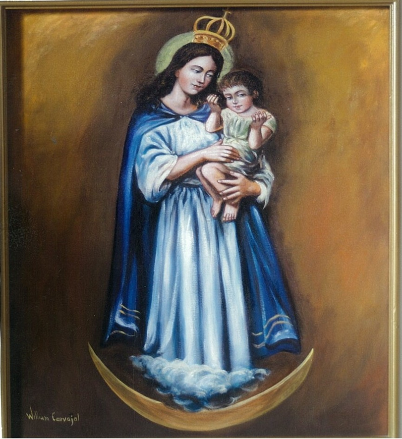 Virgen del Chaquishcahuayco,aparecida el 11 de agosto del año 2007 en la parroquia rural de Llano Chico República del Ecuador a William Carvajal .